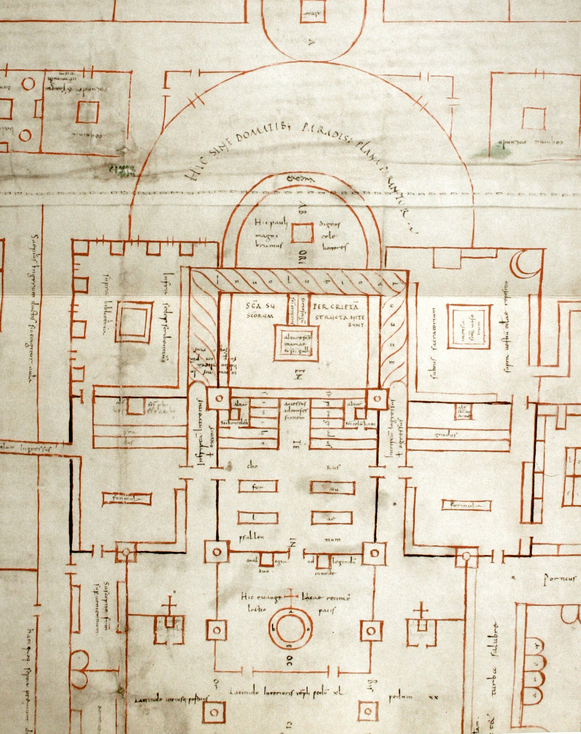 St. Galler Klosterplan; Mitte